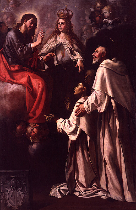 La obra representa a San Pedro Nolasco intercediendo ante Jesucristo y ante la Virgen María por sus frailes enfermos.